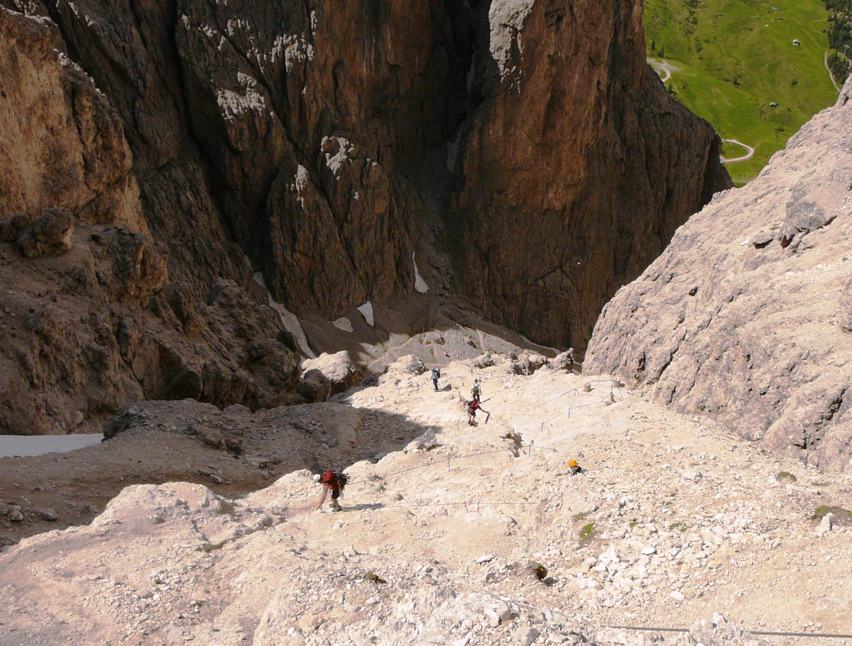 Salita al rifugio Pisciadu attraverso la Val Setus